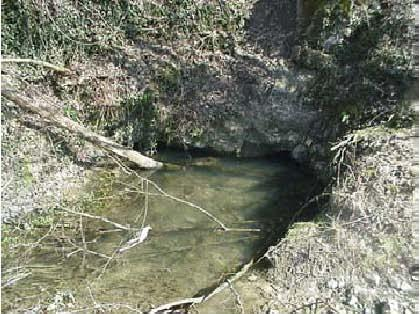 Resurgence a Marche en Famenne (Belgique dans le Font des Vaux).